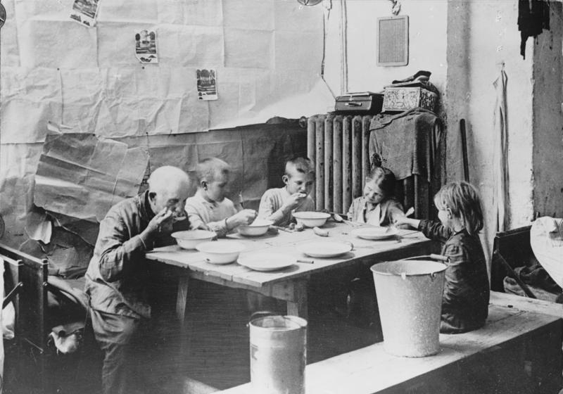 Westpreußen, Rußlanddeutsche Flüchtlinge Russlanddeutsche Flüchtlinge im Flüchtlingslager Schneidemühl (Grenzmark Posen-Westpreussen), Grossvater und Enkelkinder beim Mittagessen.